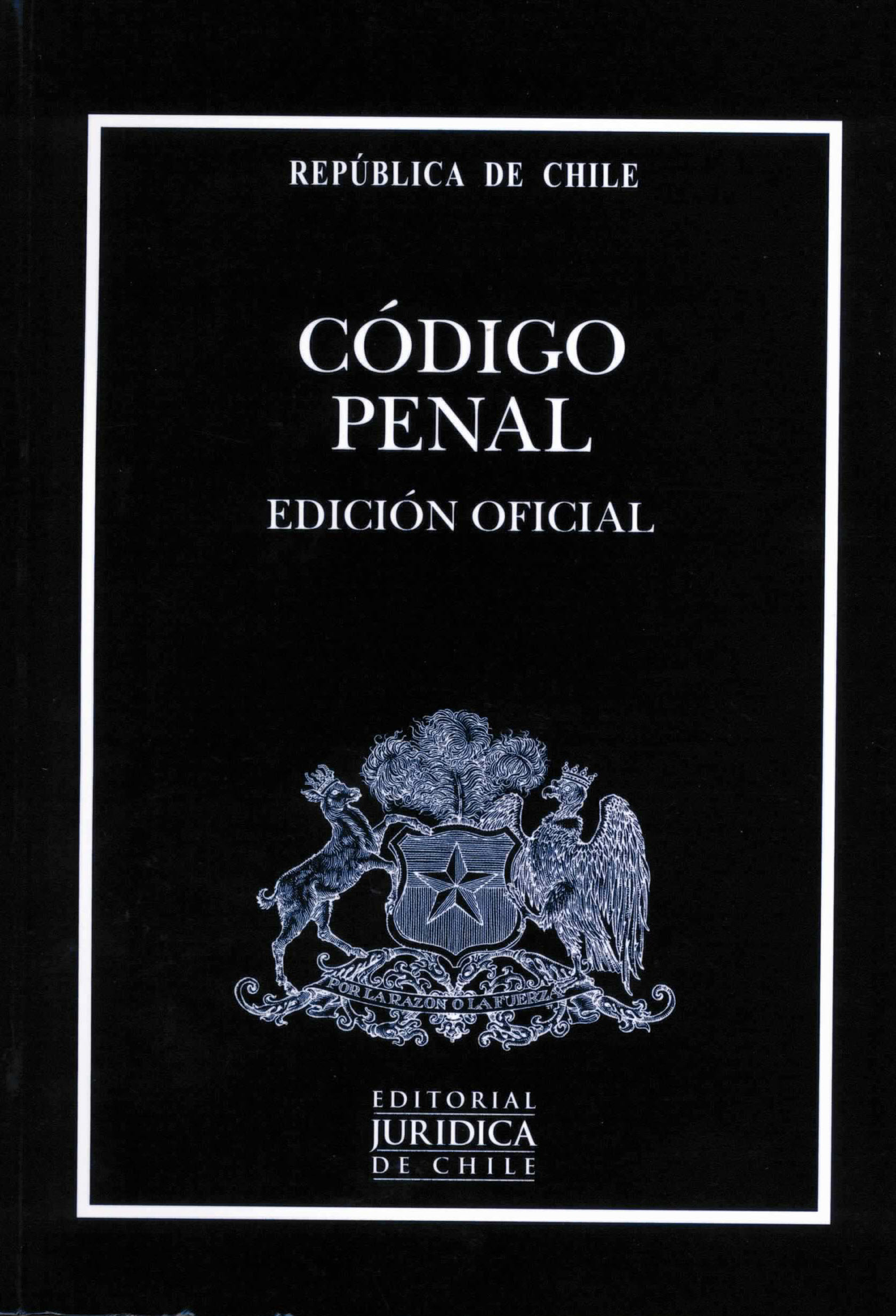 Código Penal Chileno